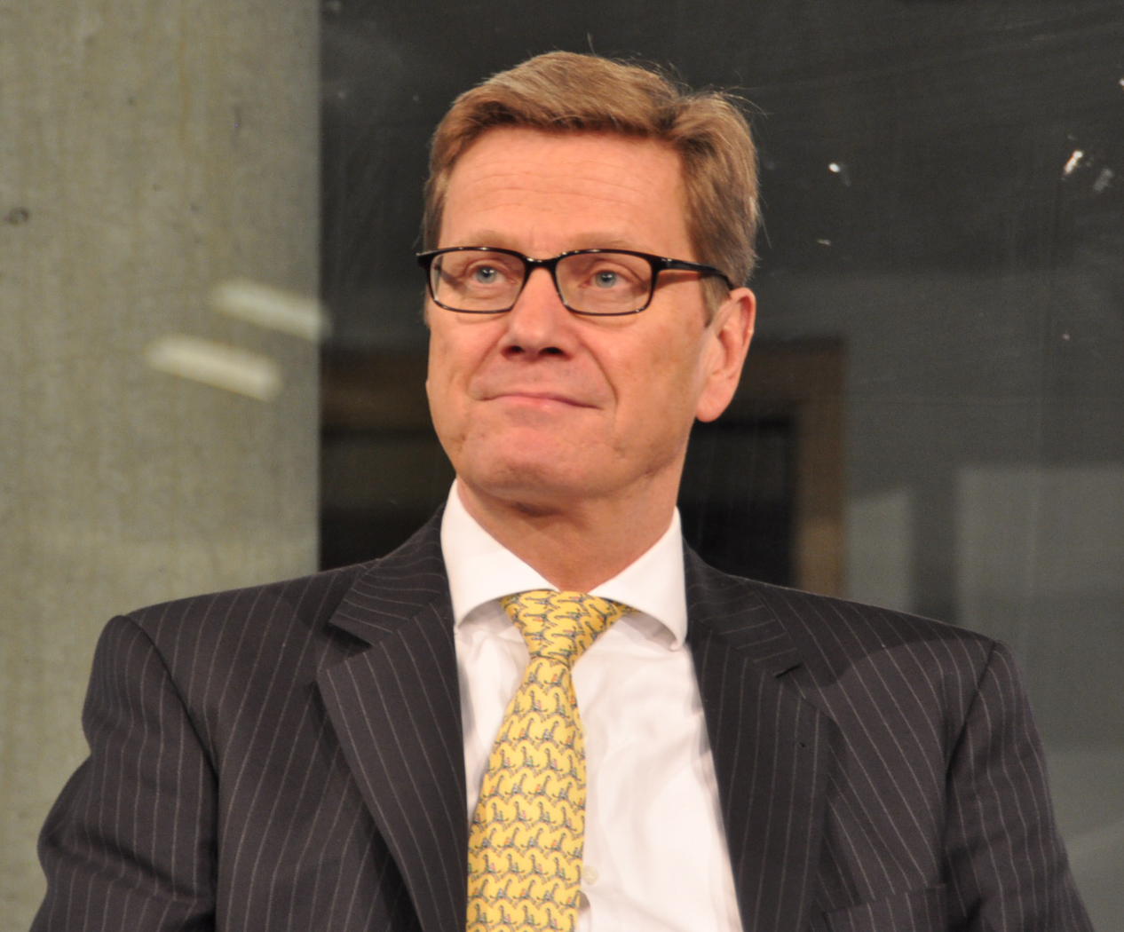 Guido Westerwelle, Bundesminister des Auswärtigen, aufgenommen am 28.02.2013 in Berlin.